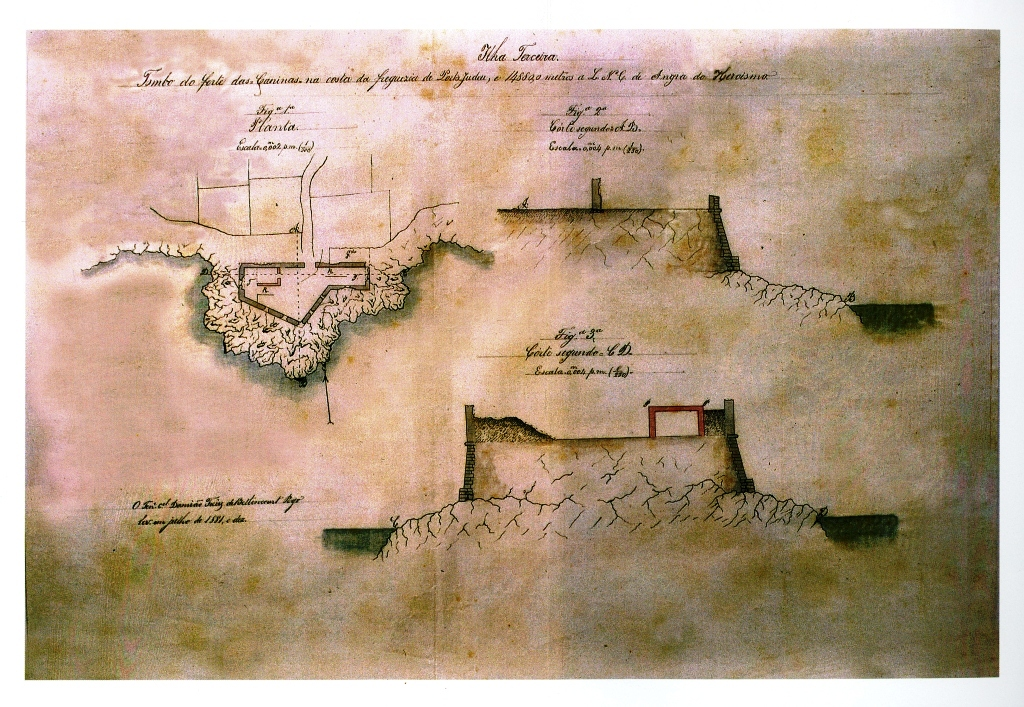 "Tombo do Forte das Caninas, na costa da freguesia do Porto Judeu...", Ilha Terceira (Açores), Portugal.